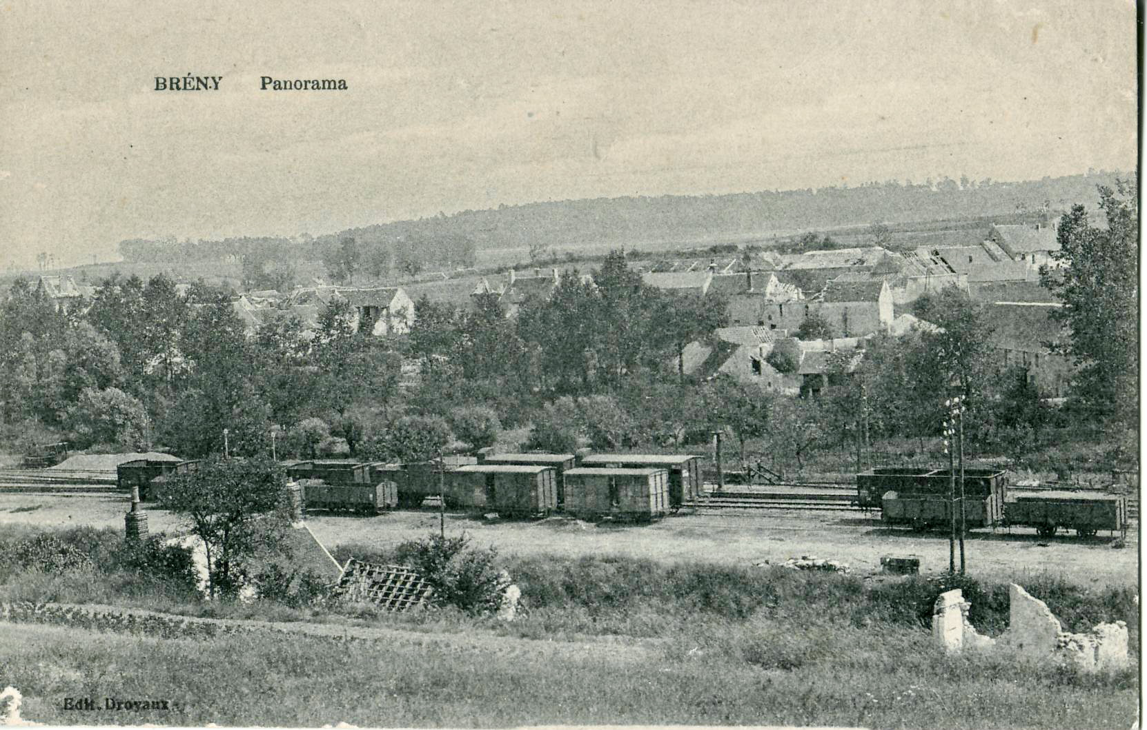 Carte postame ancienne éditée par Droyaux : BRENY - Panorama